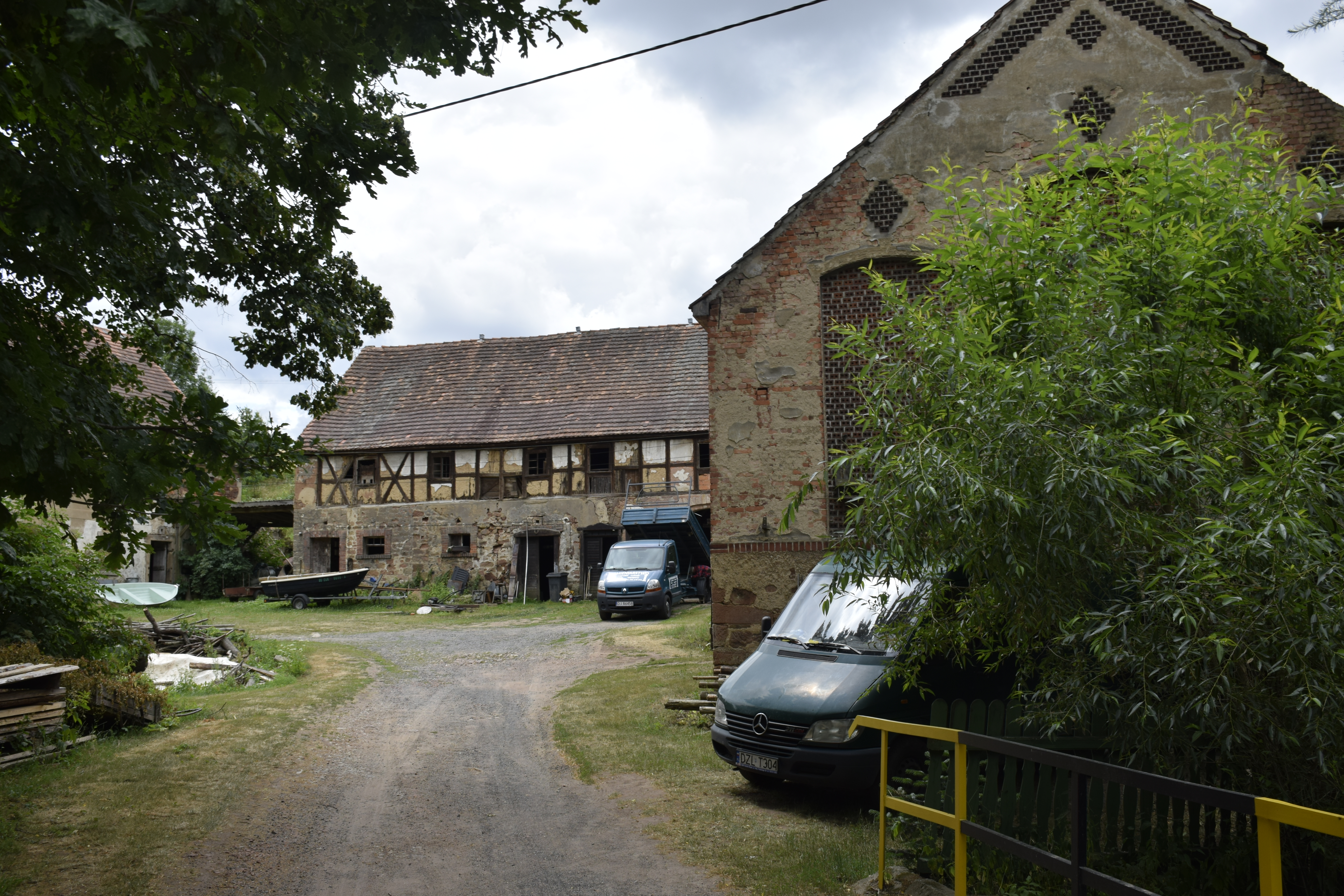 Gozdno (województwo dolnośląskie) Biegoszów. Polska.